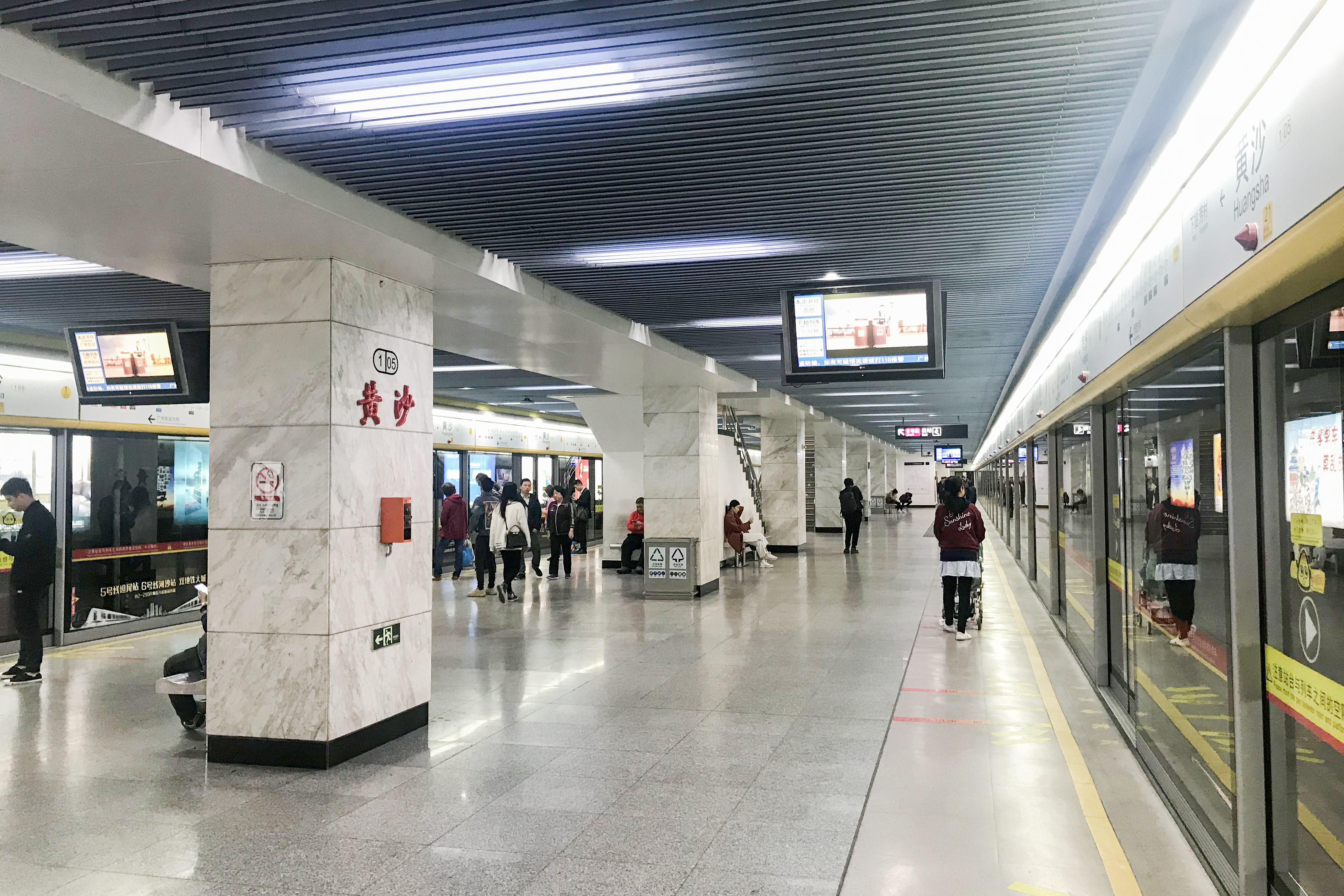 广州地铁黄沙站